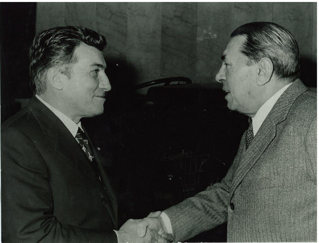 Francesco Cassani con Ferruccio Lamborghini